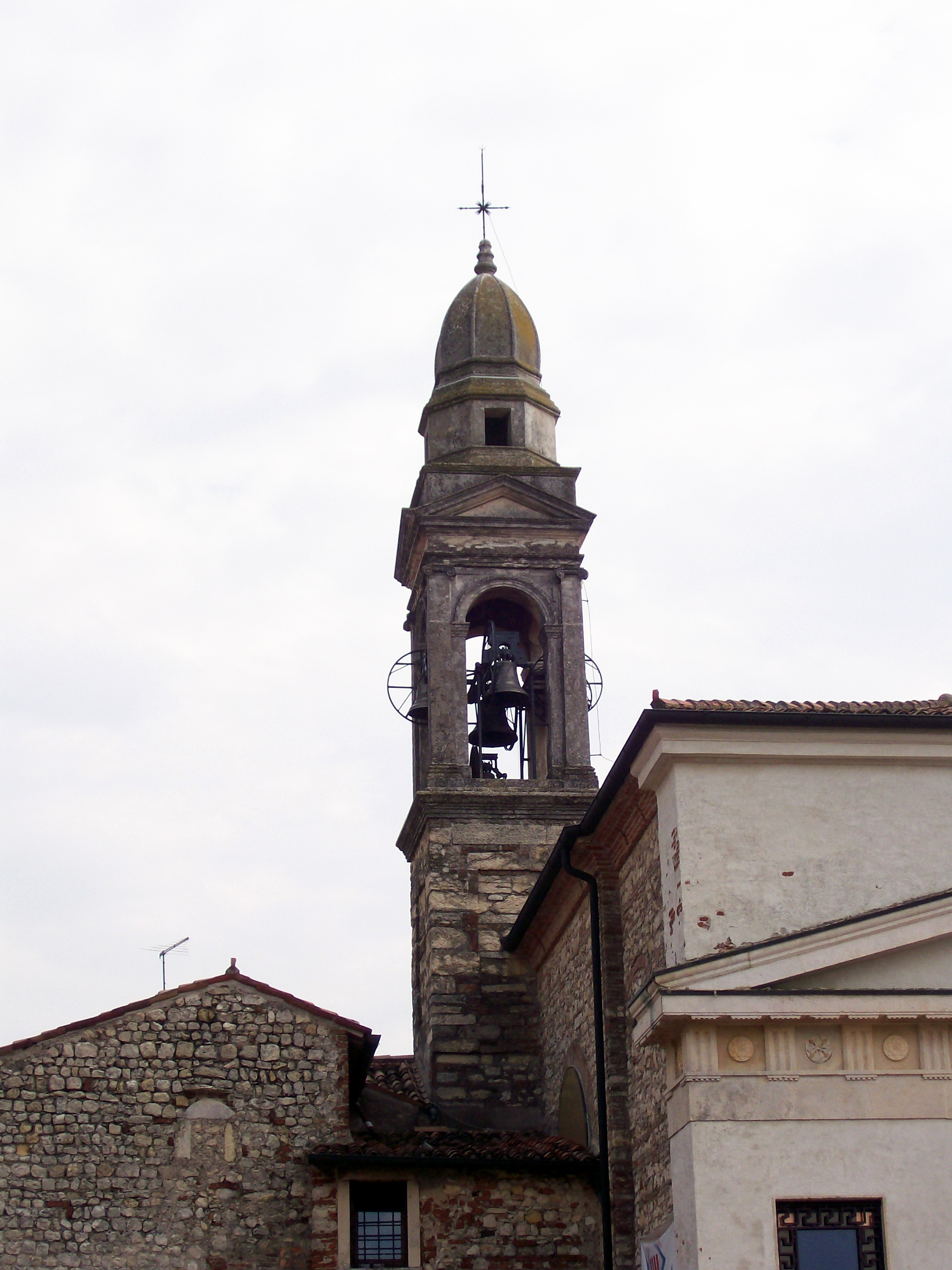 Campanile del Santuario della Madonna della Bassanella in Soave (VR).